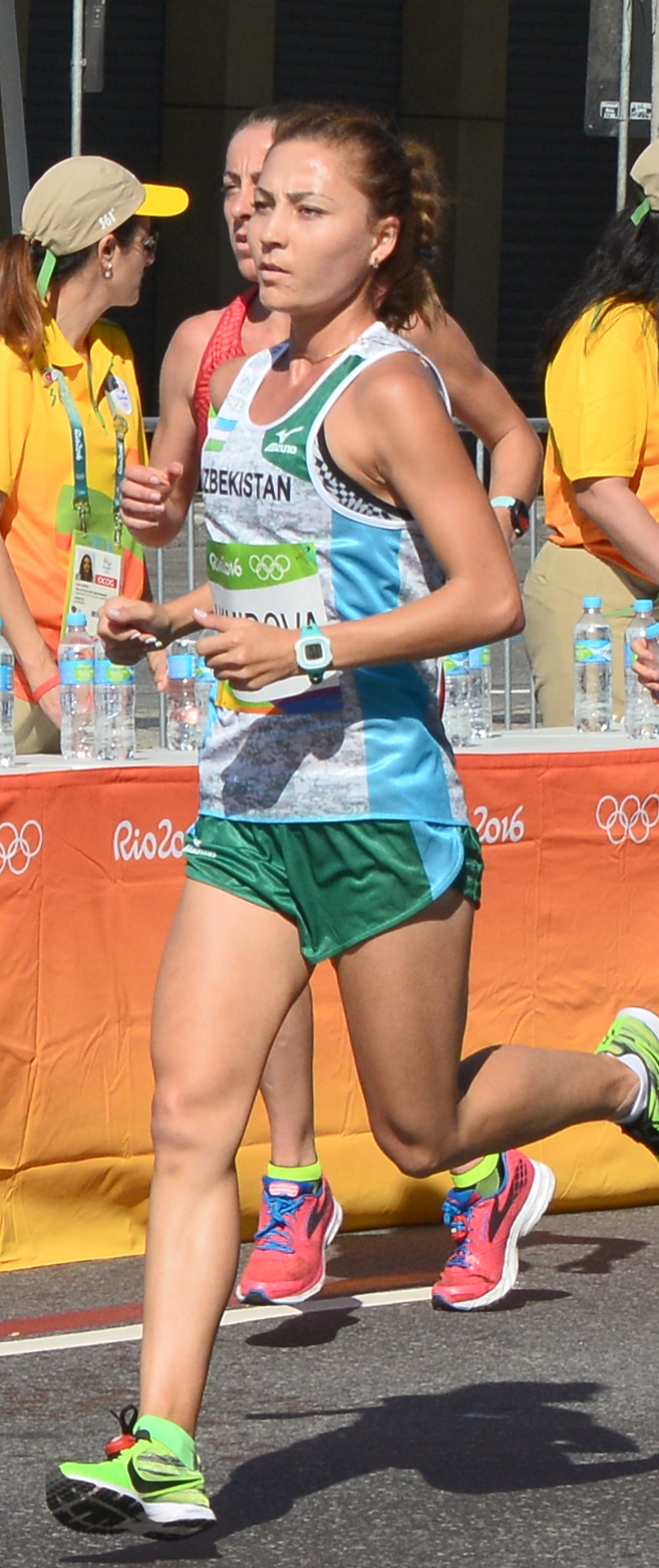 Passage du marathon des jeux olympiques de Rio 2016 dans le centre de Rio